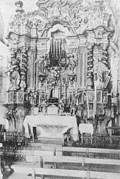 Imatge de retaule destruit en 1936 de: Santuari de Puiggraciós.(Vallès Oriental-Catalunya), s.XVIII.